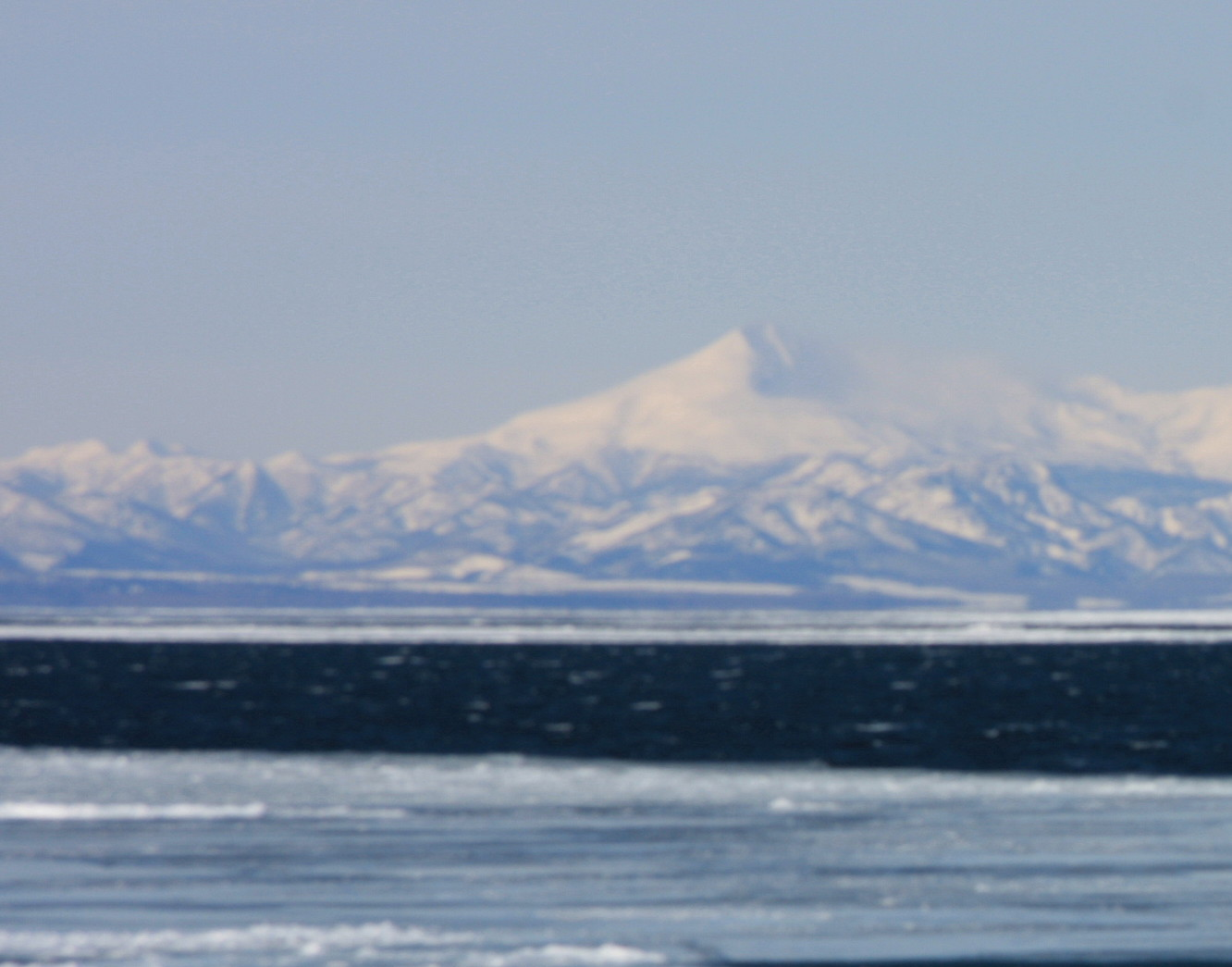 遠音別岳 野付半島より望見